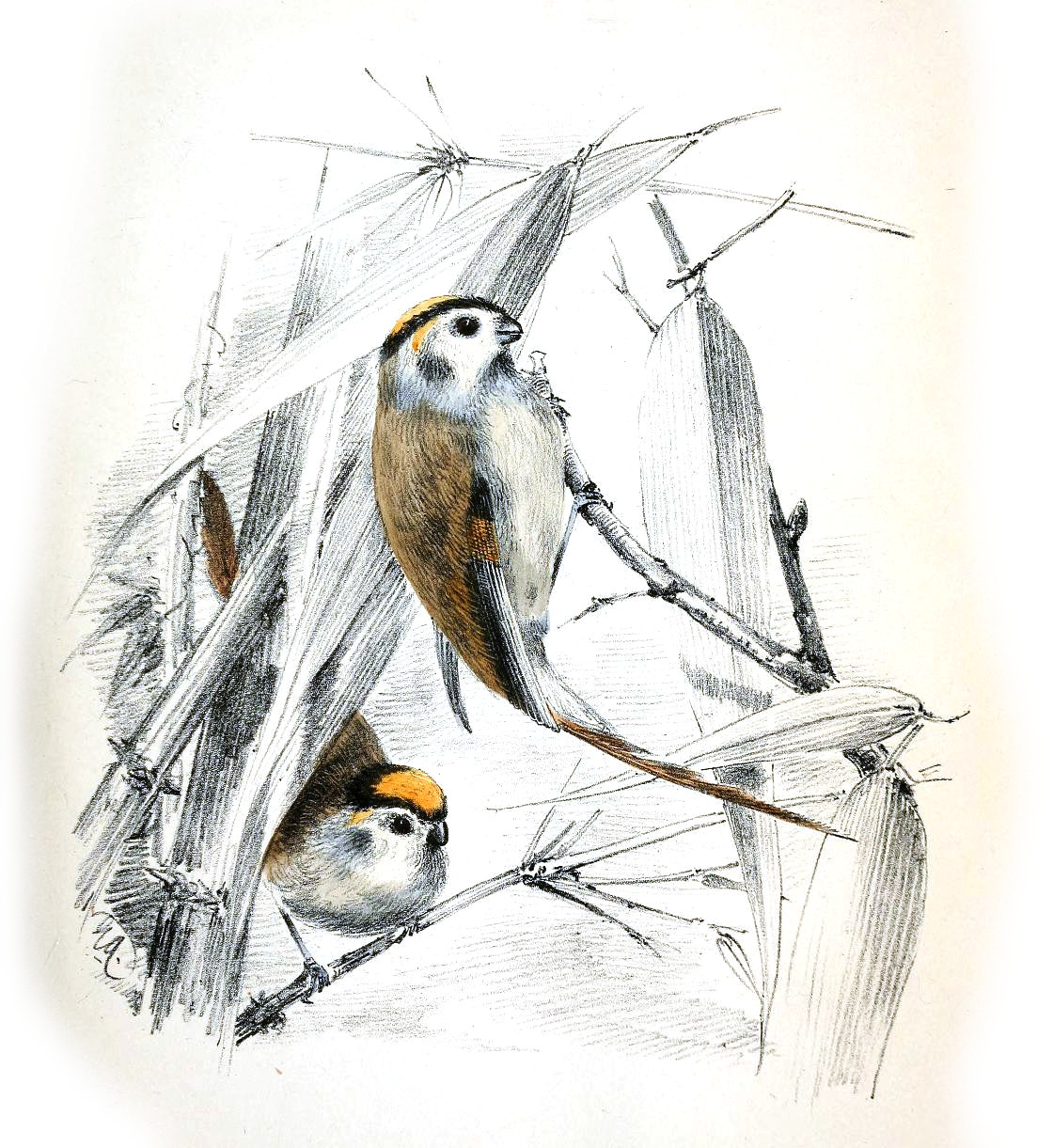 Paradoxornis nipalensis poliotis